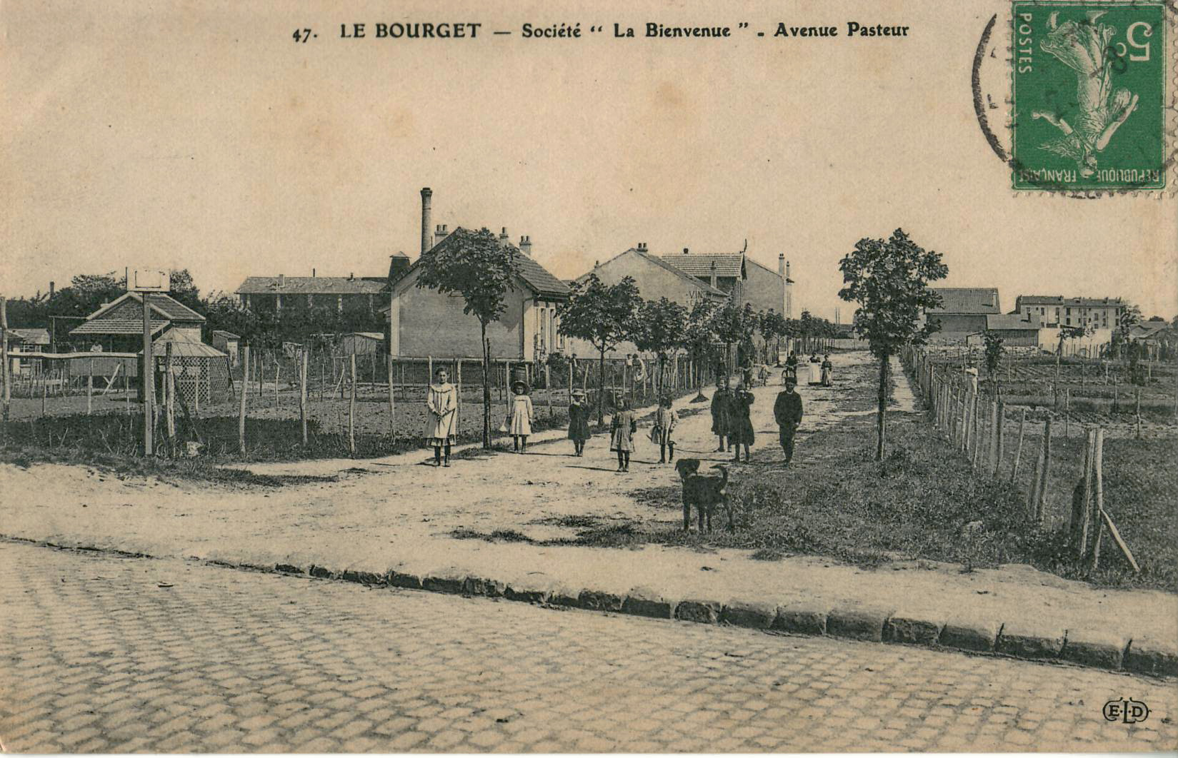 Carte postale ancienne éditée par ELD, n°47 :LE BOURGET - Société « La Bienvenue » - Avenue Pasteur